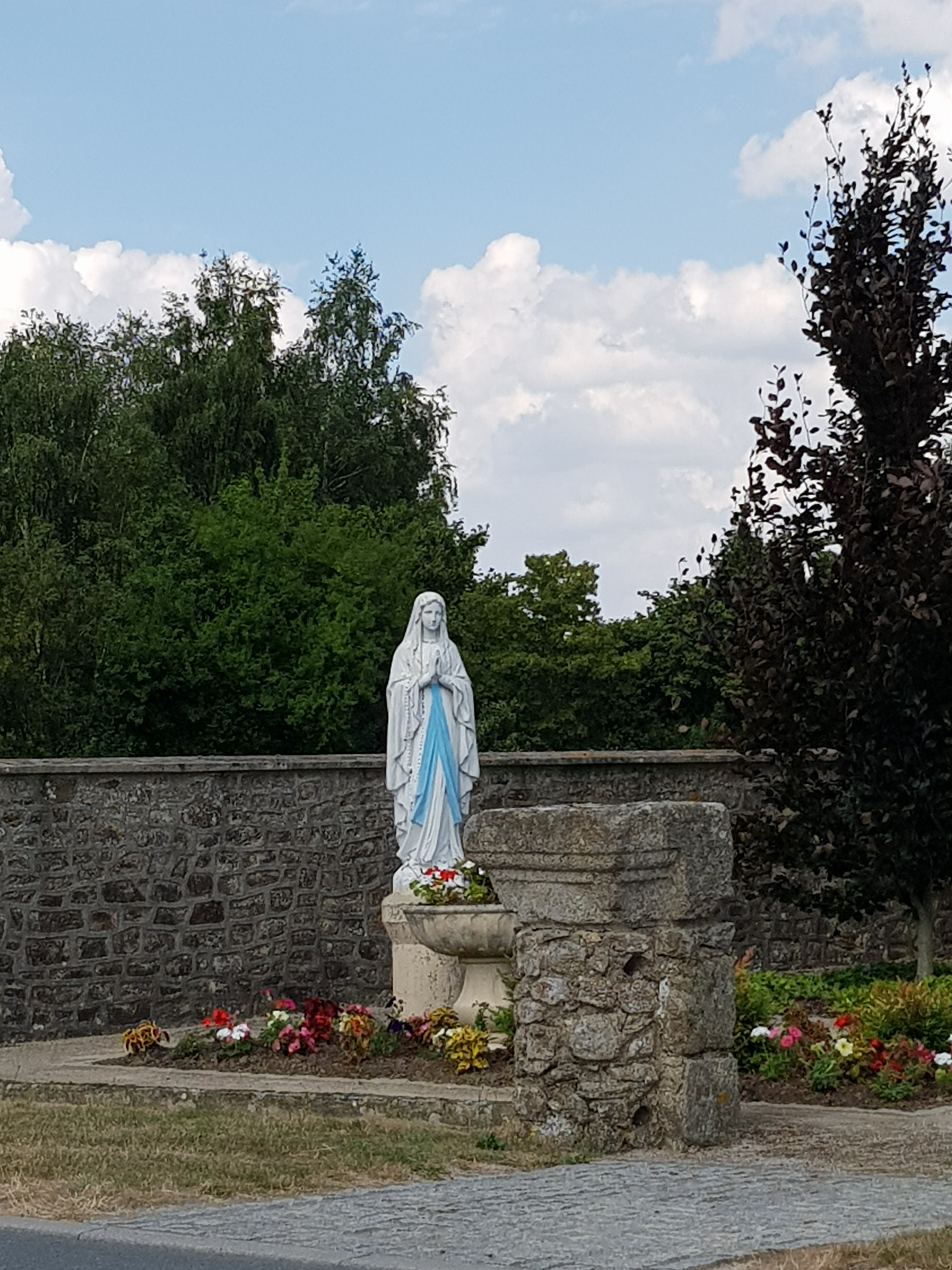 Statue de Notre-Dame de Lourdes à Commer (53)